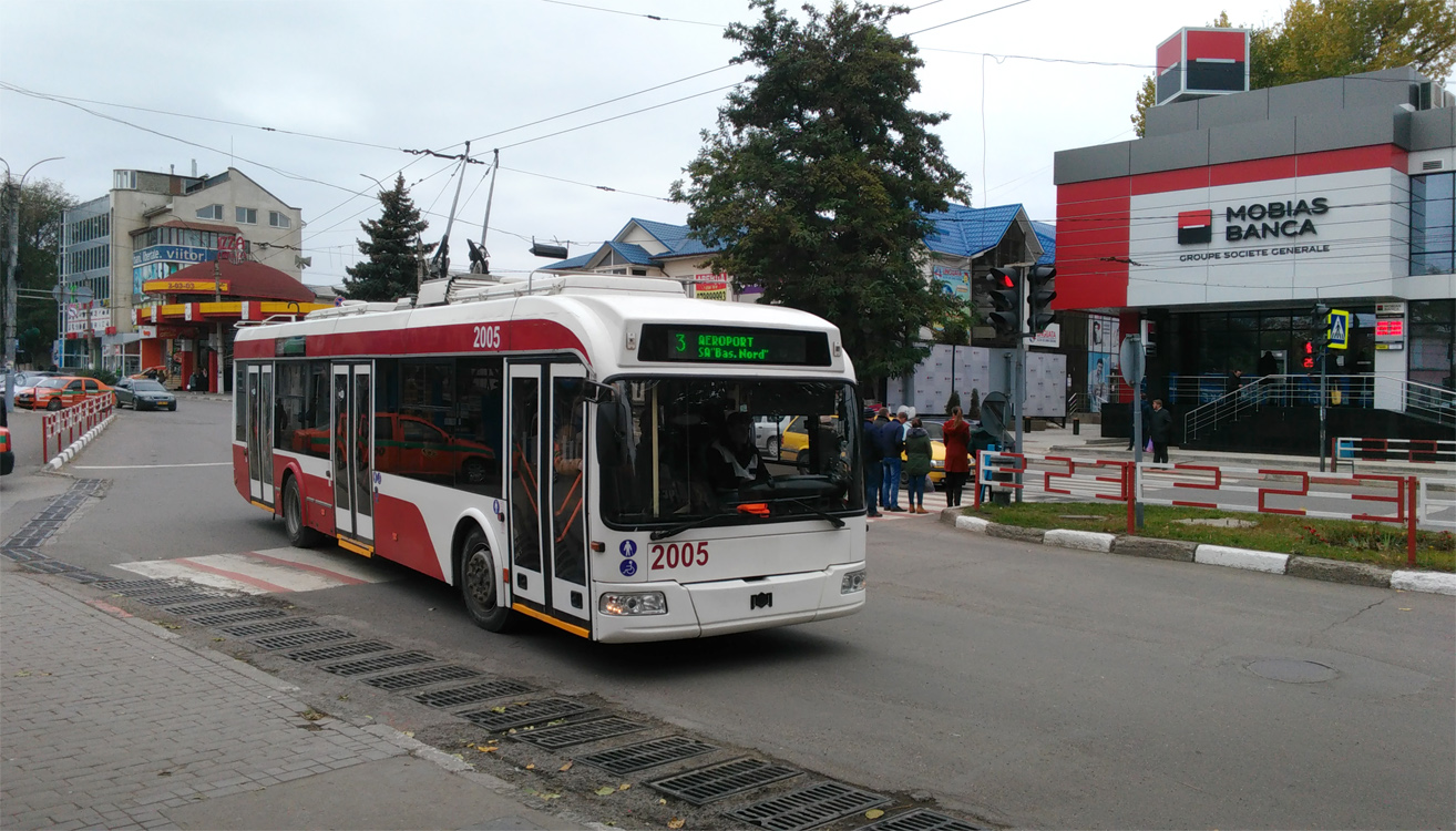 Троллейбус в Бельцах